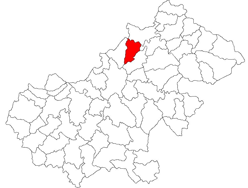 Categorie:Hărţi ale judeţului Satu Mare